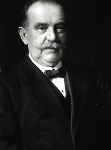 Casimir von Arx (1852–1931) Fotografie 1917